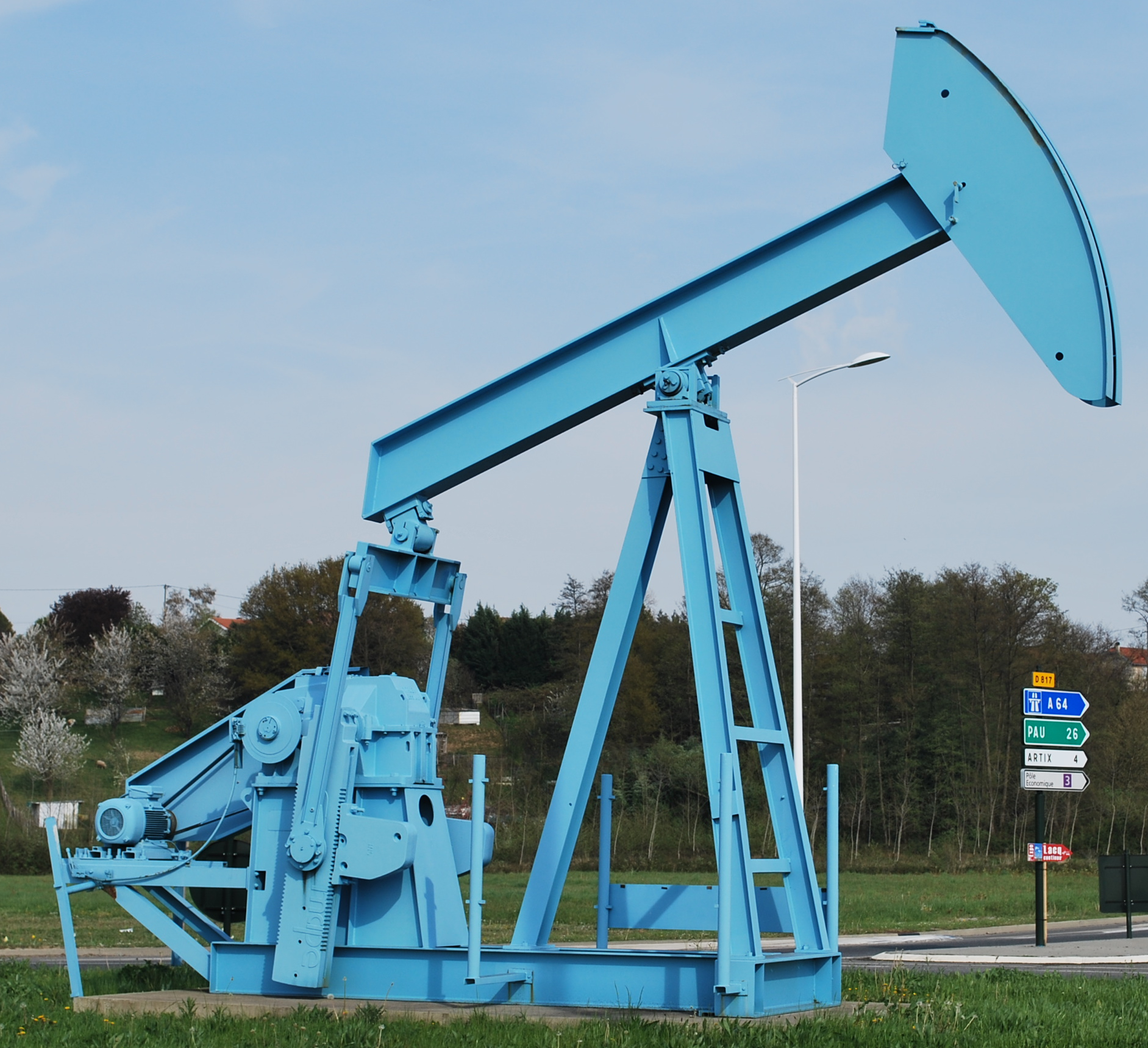 Rond-point de Lacq (Pyrénées-Atlantiques).